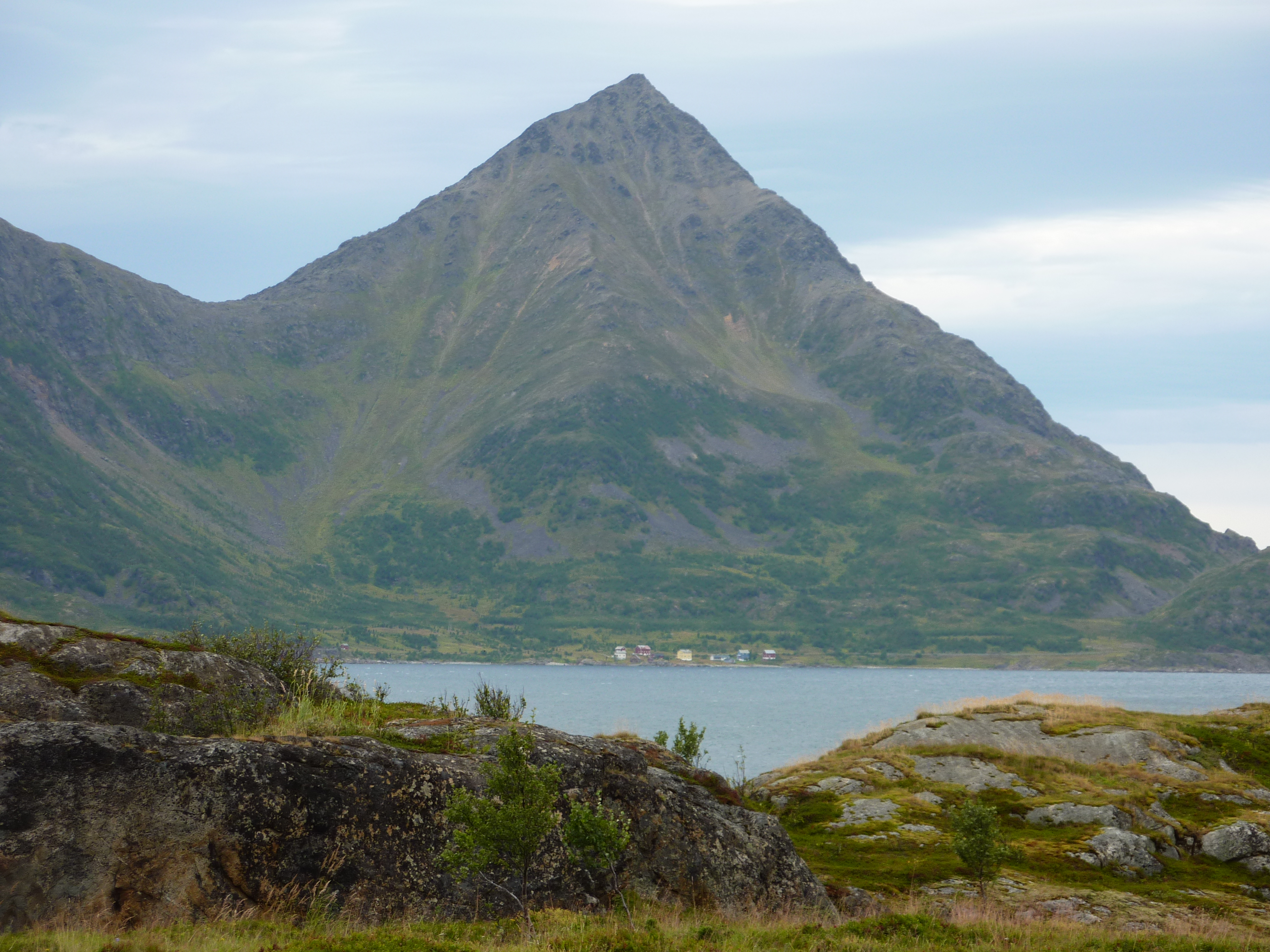 Tverrfjord in Loppa, Norway